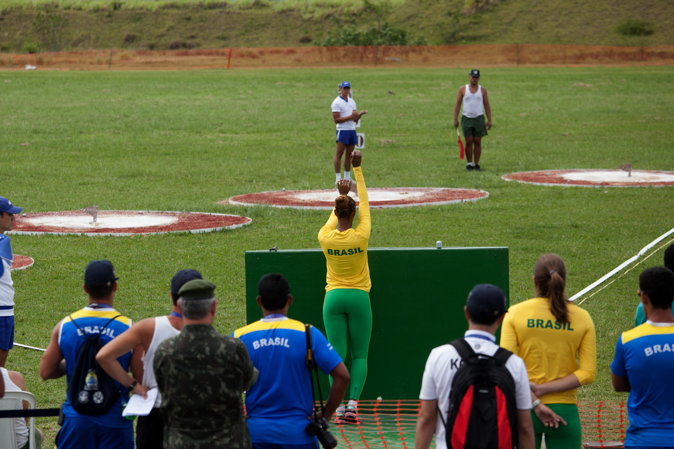 9 a 18/11/2013, Rio de Janeiro - RJ. Fotos: Felipe Barra